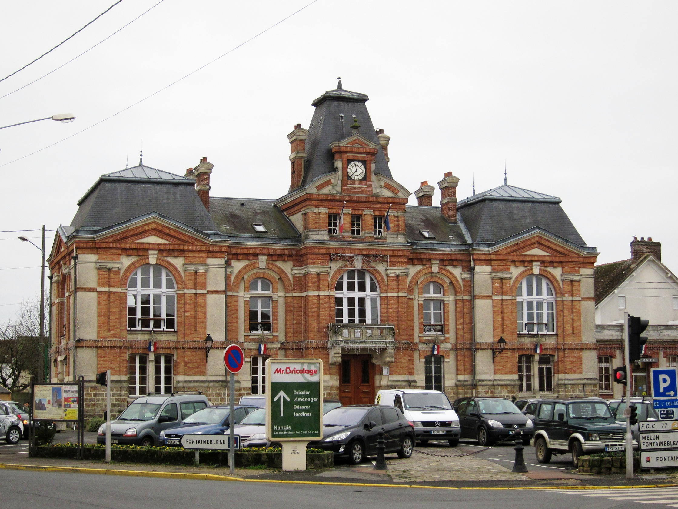 La mairie de Mormant.